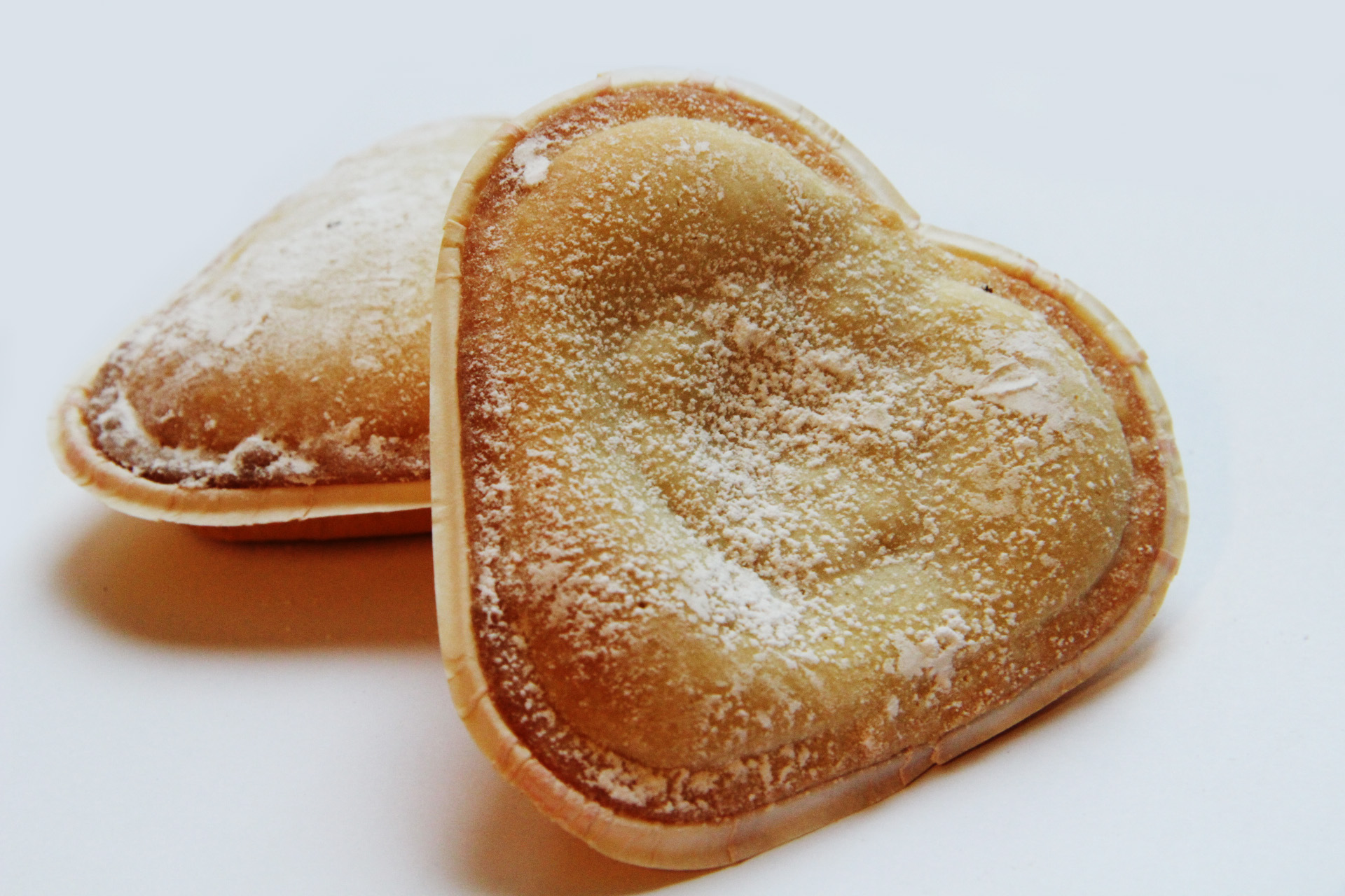 En bild på vaniljhjärtan.